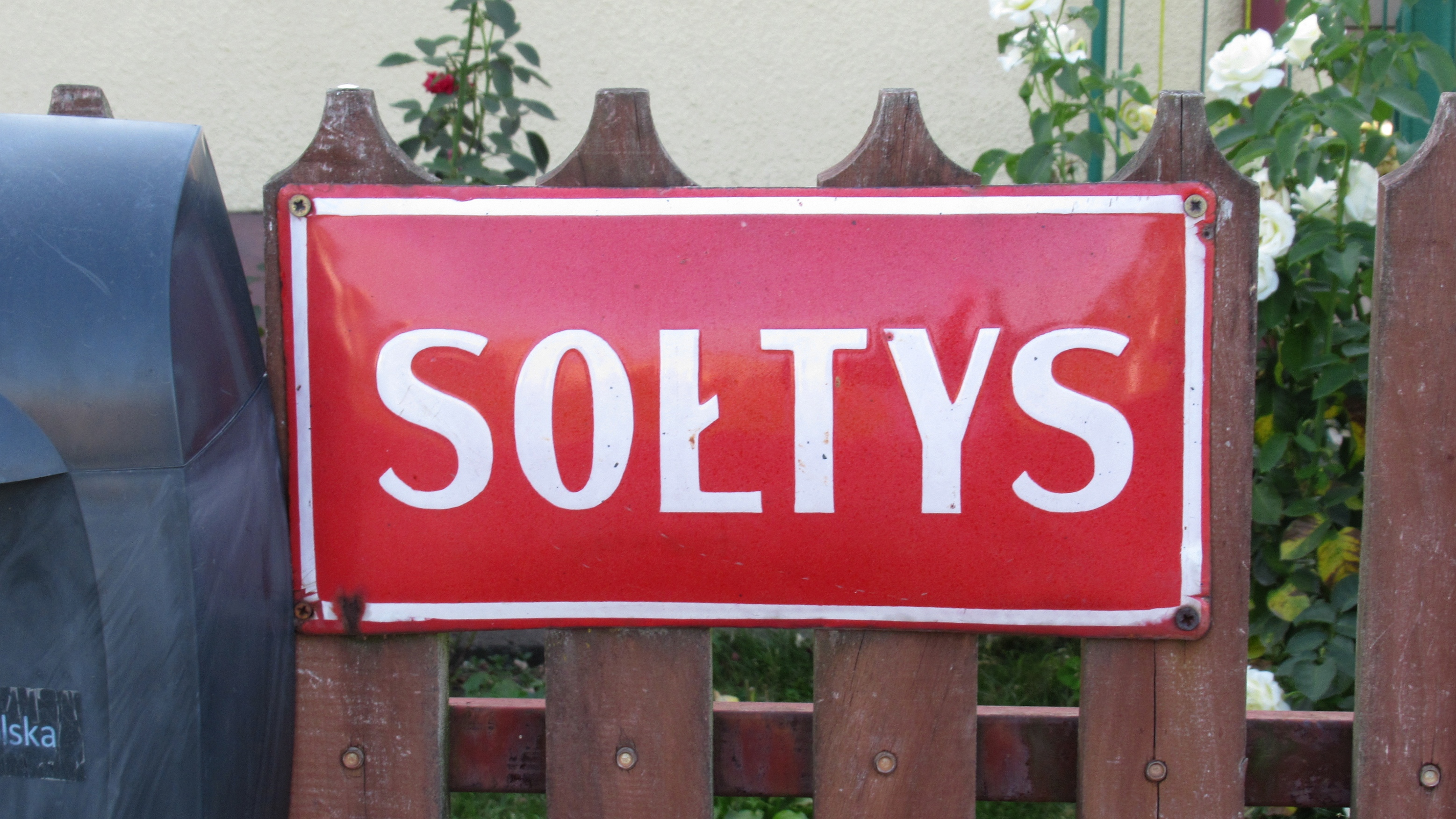 Kodeń (pow. bialski, woj. lubelskie, Polska). Tabliczka z napisem „SOŁTYS”.